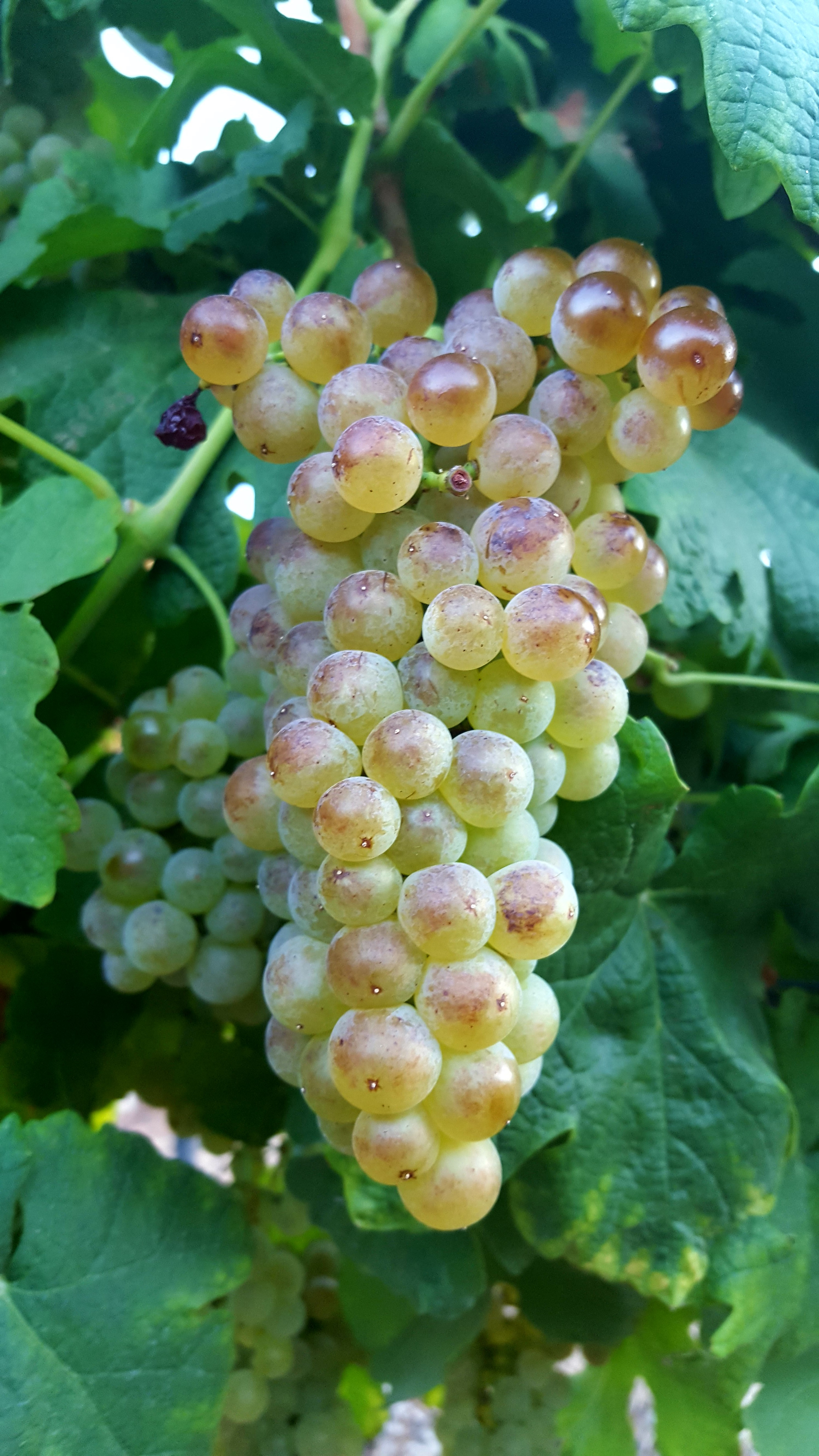 אשכול רוסאן בשל, דלתון הגליל העליון